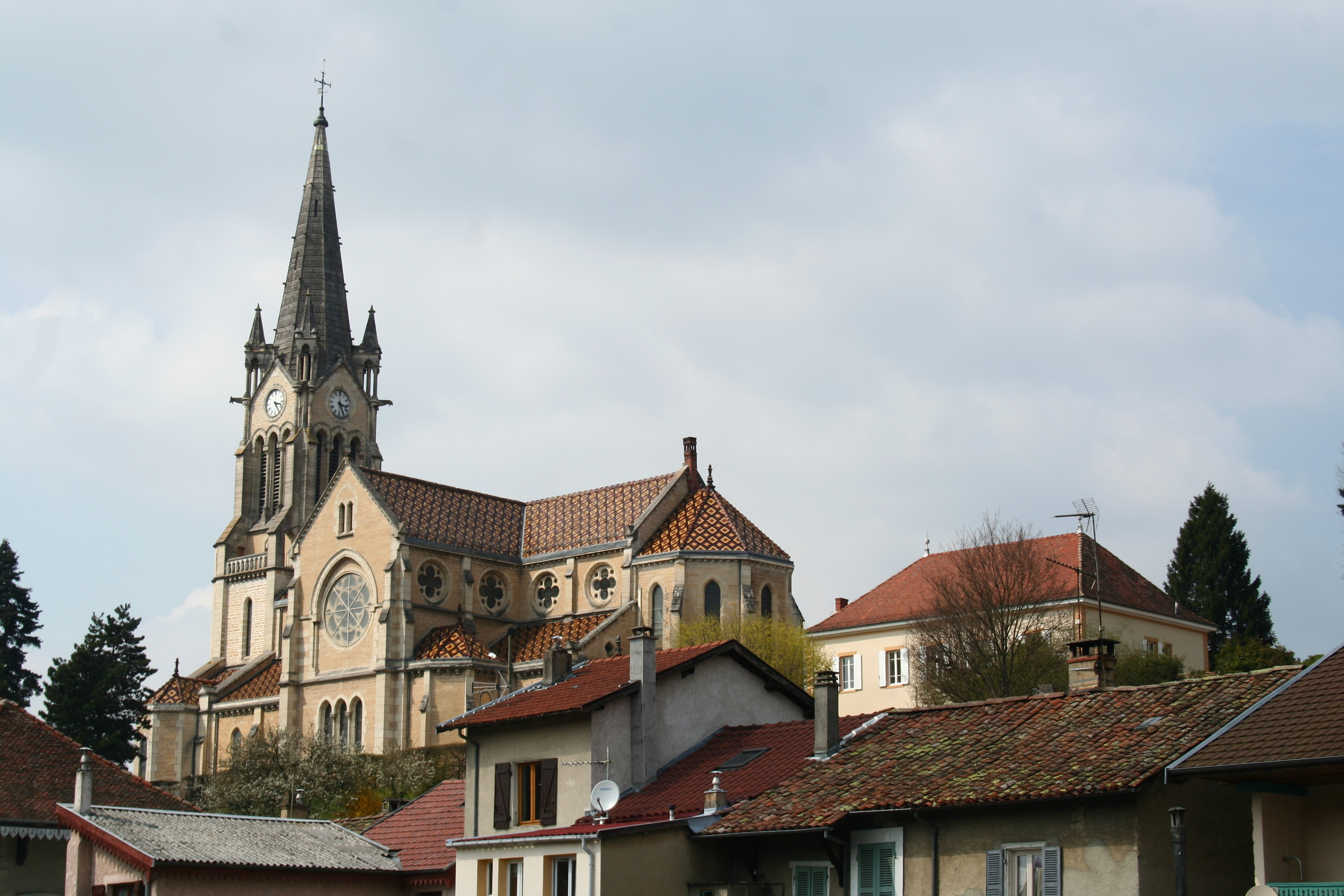 La Tour du Pin (38) Vue sur l'église